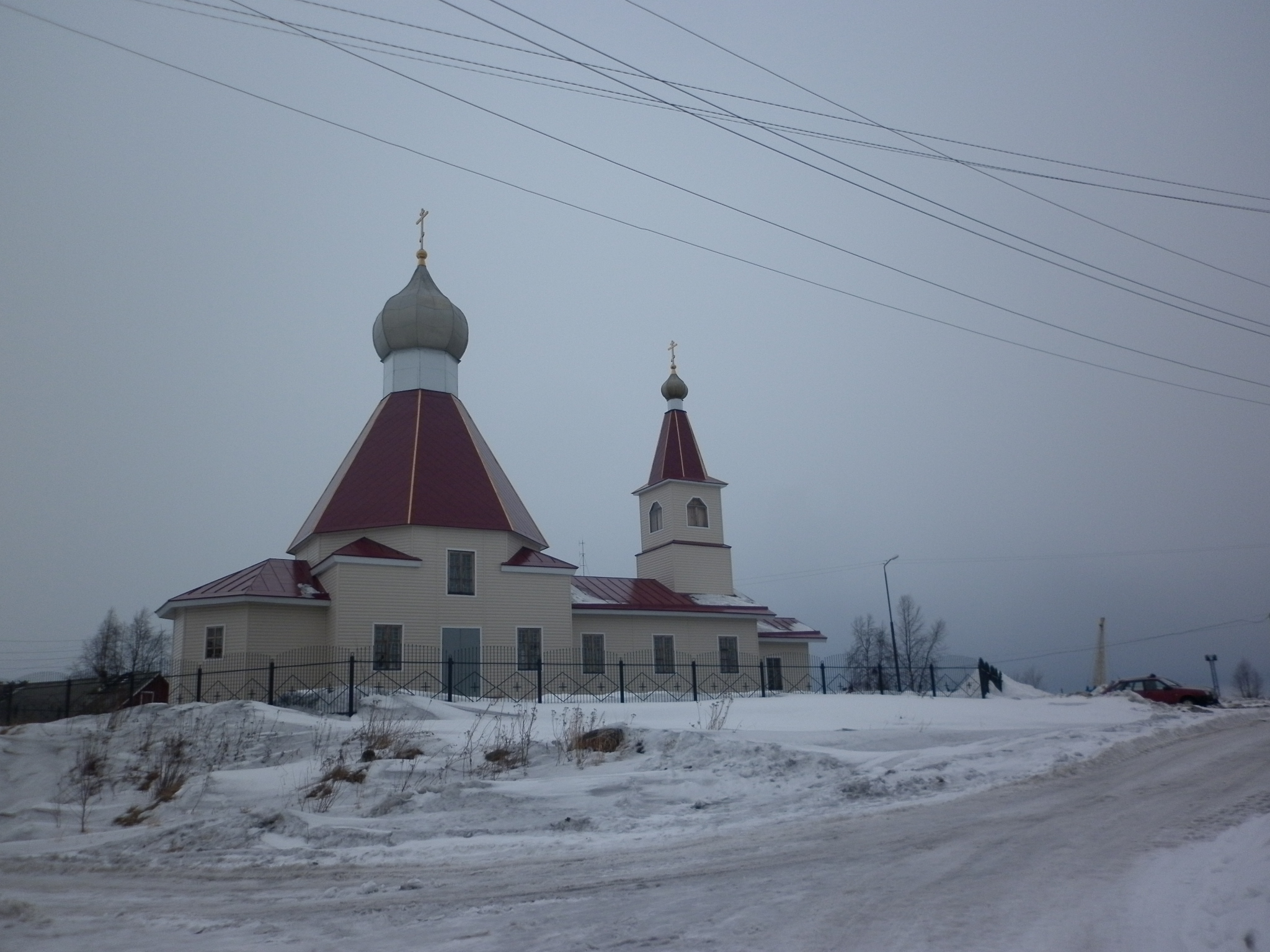 Построена в 2005 году.